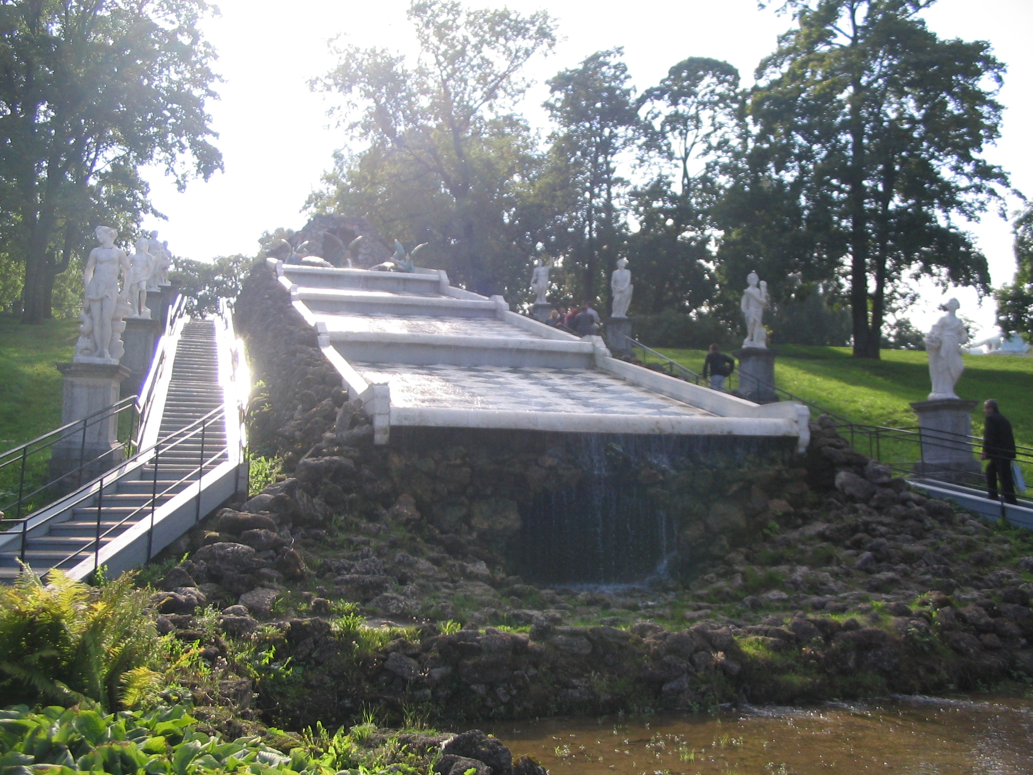 Каскад "Шахматная гора", Петергоф